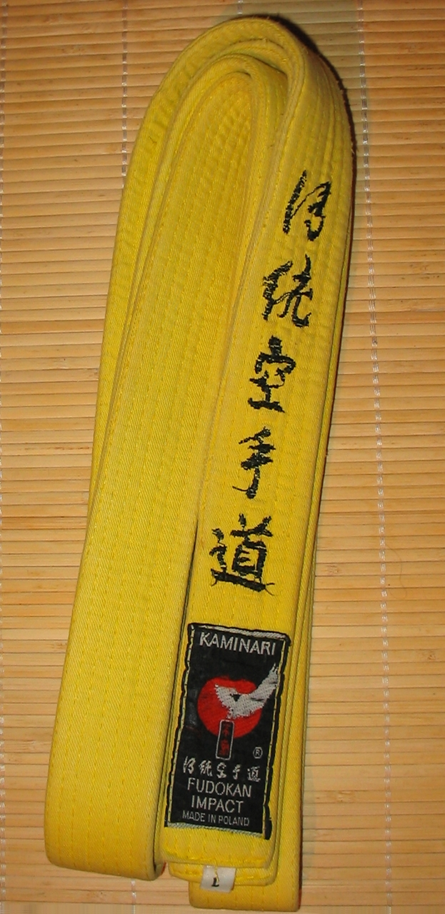 Karate - żółty pas. Autor zdjęcia: Dariusz "iDAREK" Więckiewicz